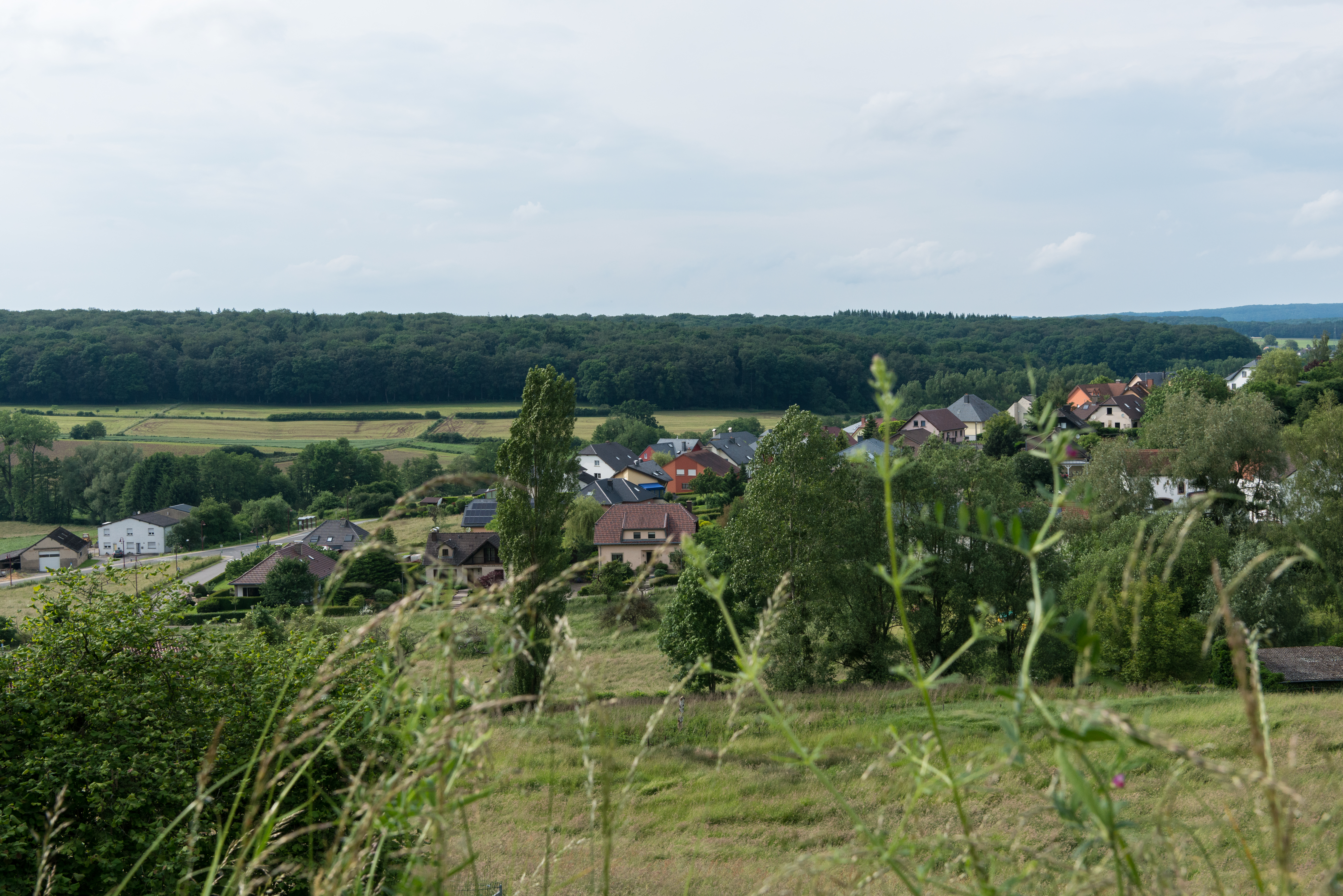 Vue op Miedernach.